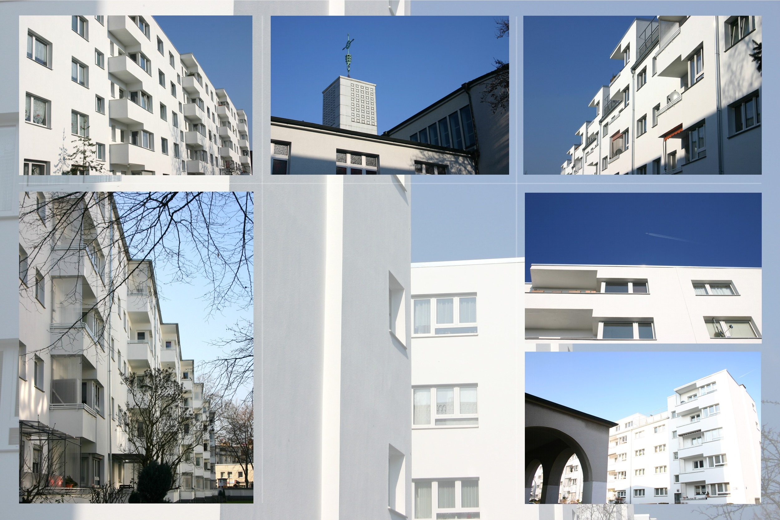 Bauhaussiedlung Weiße Stadt, Köln-Buchforst, Architekt: Wilhelm Riphahn, erbaut 1928-1931